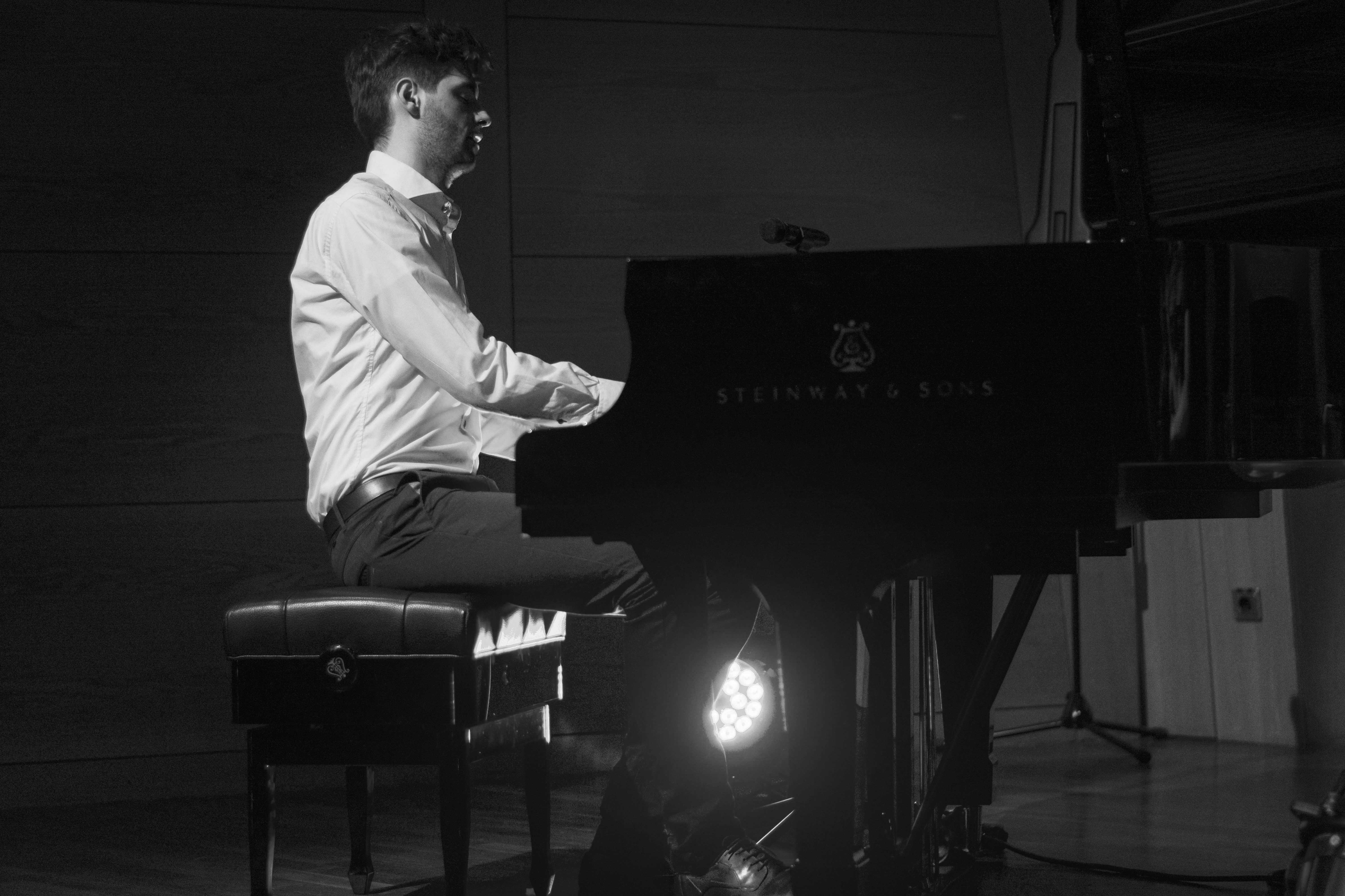 Florian Christl beim "Inspiration" Release Konzert in München